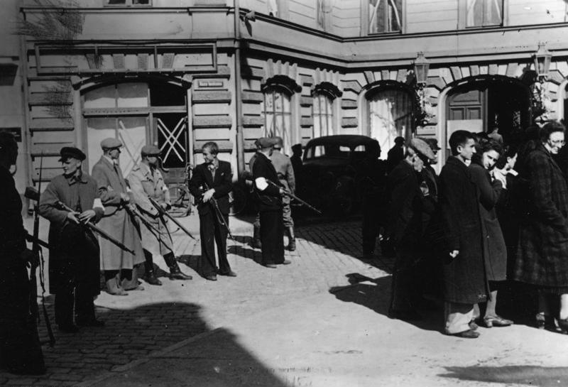 Libau, Zusammengetriebene Juden ADN-Bildarchiv II. Weltkrieg 1939-1945 Judenverfolgung in den baltischen Staaten nach dem Einmarsch der faschistischen deutschen Wehrmacht im Juni 1941. Lettischer "Selbstschutz" hat in Libau (Liepaja) Juden zum Verhör zusammengetrieben. Aufnahme: Peter / Juli 1941 8887-41 [Scherl Bilderdienst]